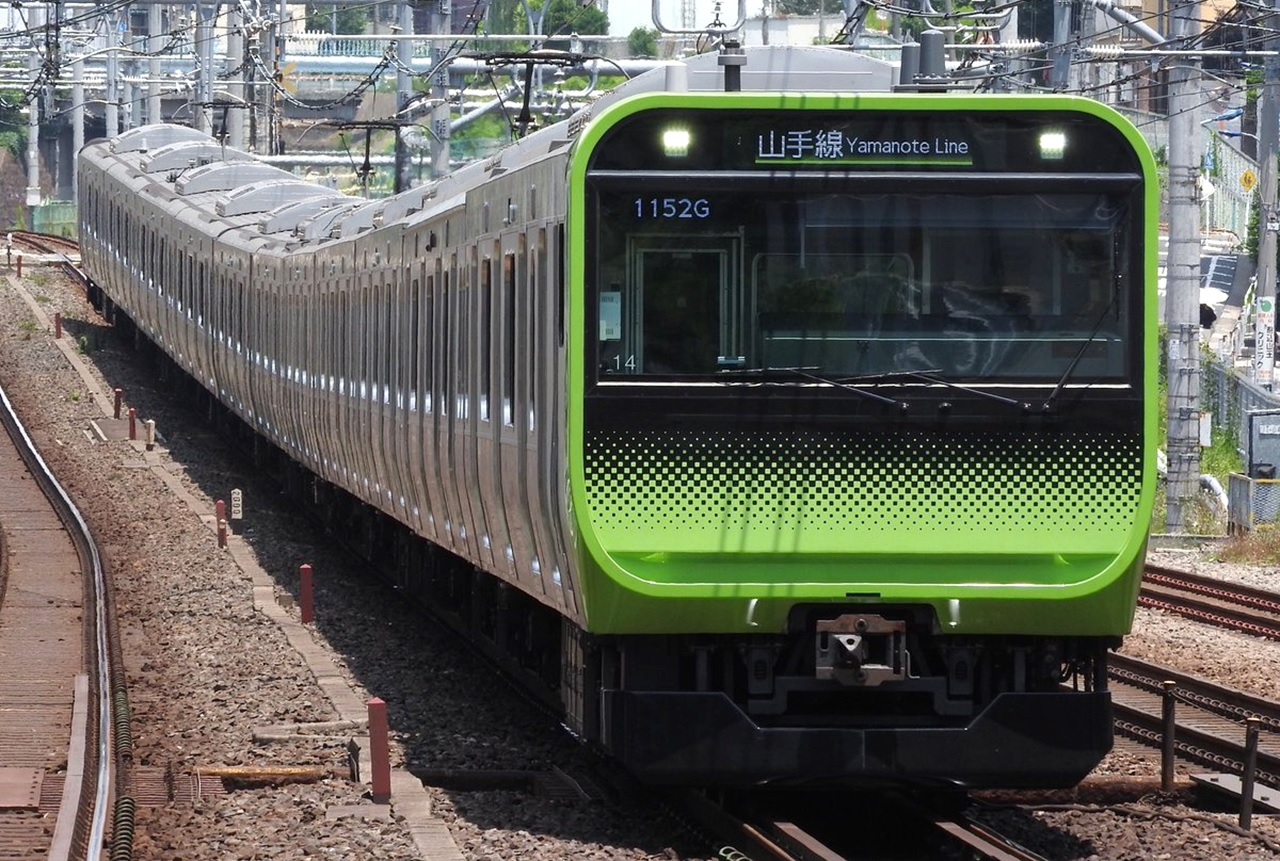 山手線E235系東トウ14編成。 田端駅～駒込駅間にて